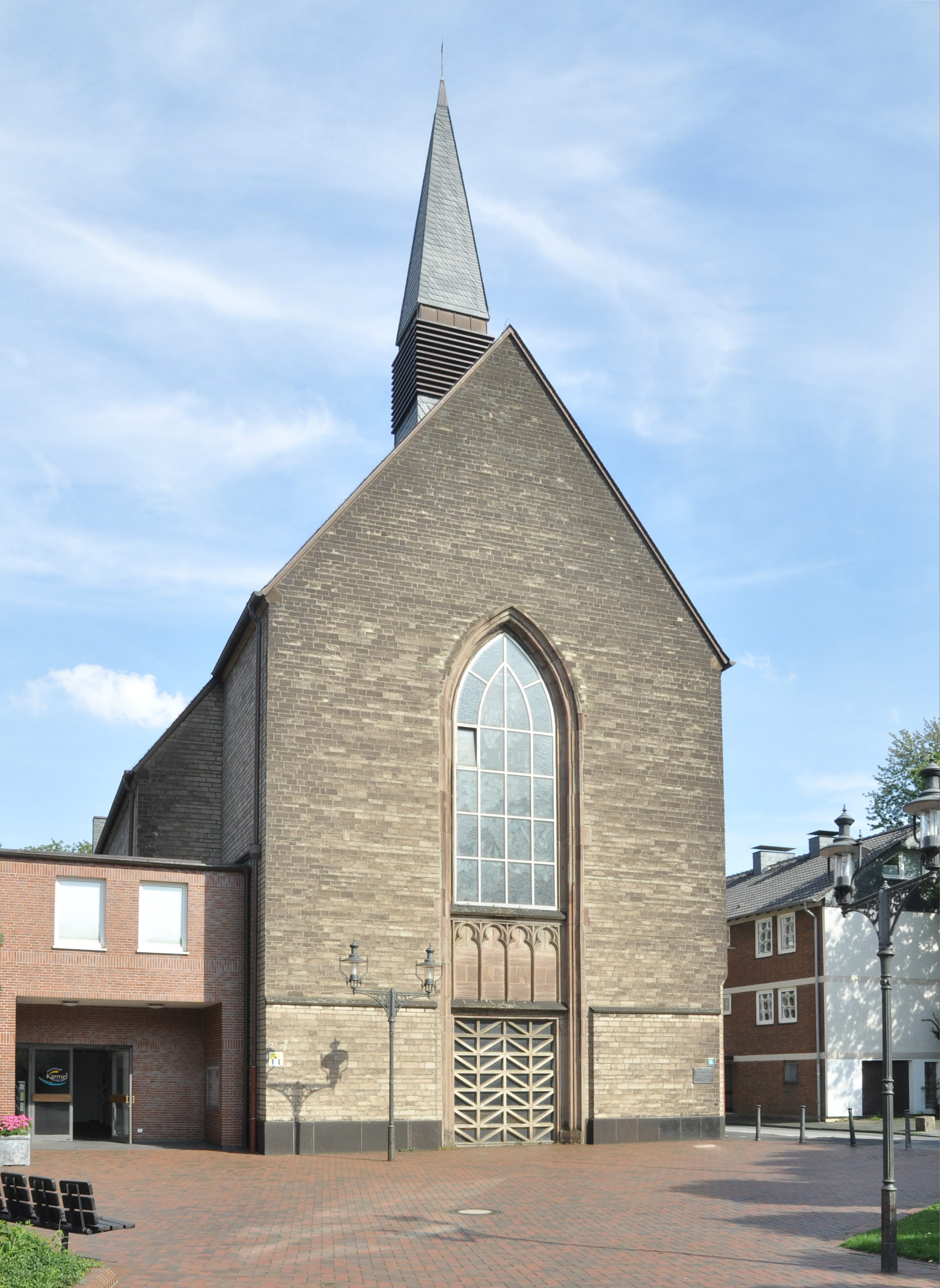 Westfassade der Karmelkirche DuisburgThis is a photograph of an architectural monument., no. 338